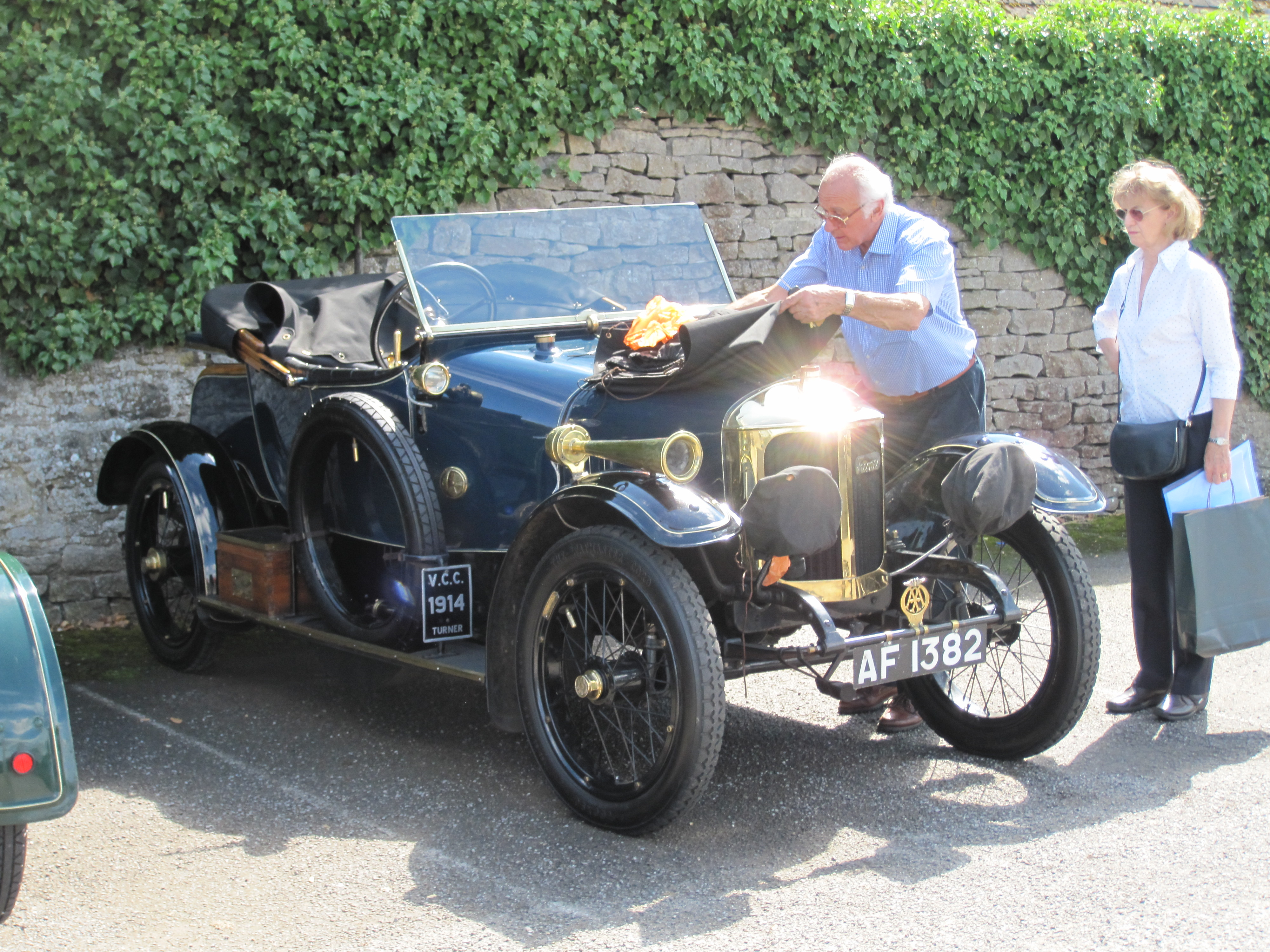 1914 Turner Wolverhampton Cricklade